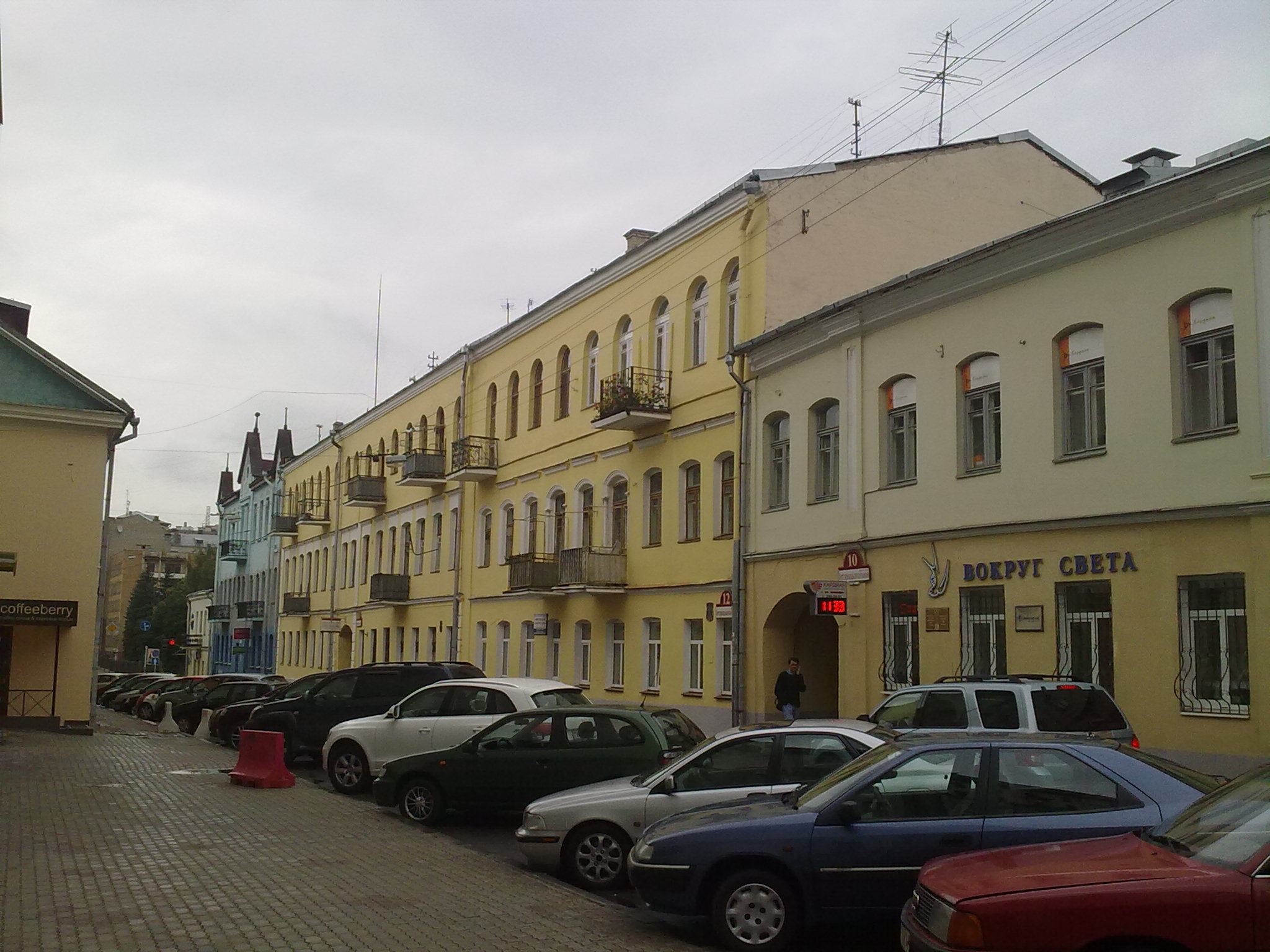 Мінск. Вуліца Інтэрнацыянальная. 2012